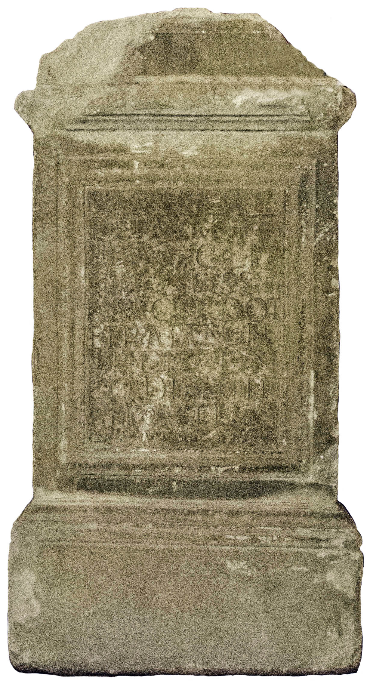 Autel taurobolique de Verinia Severa, 241 ap. JC, marbre. Musée Eugène-Camoreyt de Lectoure, Gers, France.